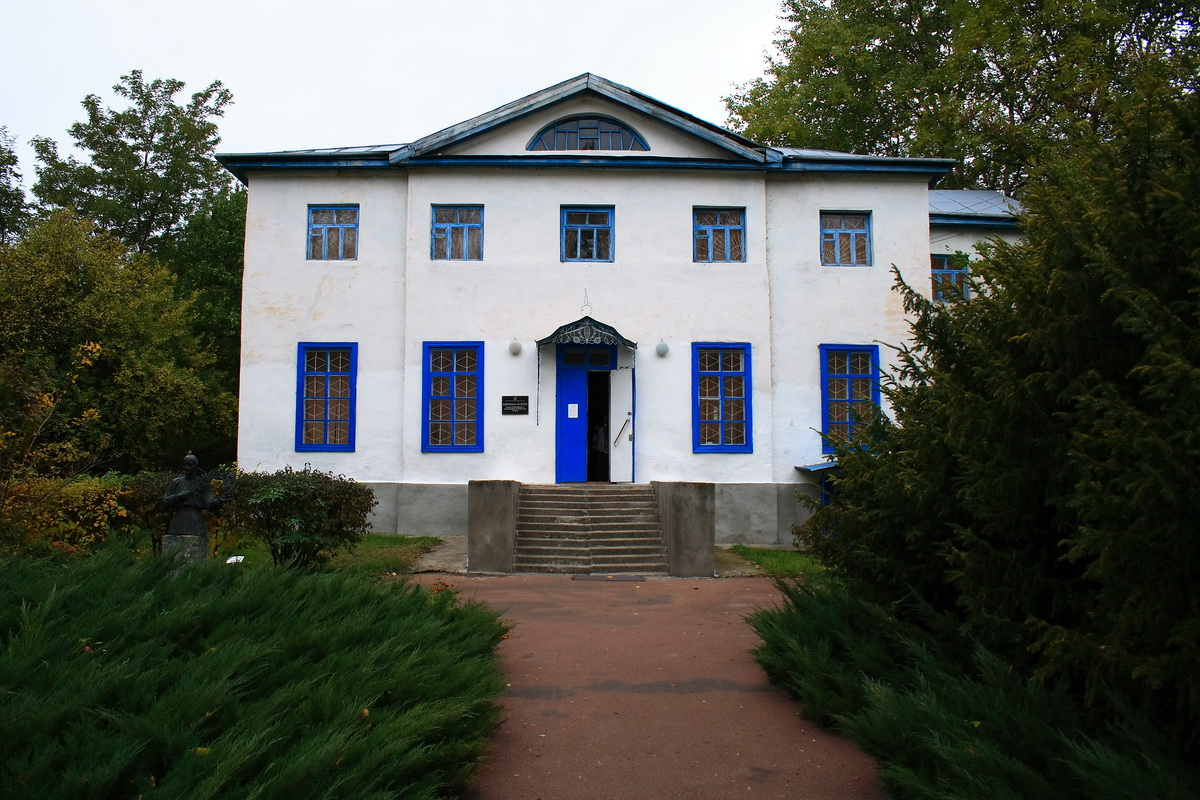 Місто Яготин. Картинна галерея. Відділ Яготинського Державного Історичного Музею